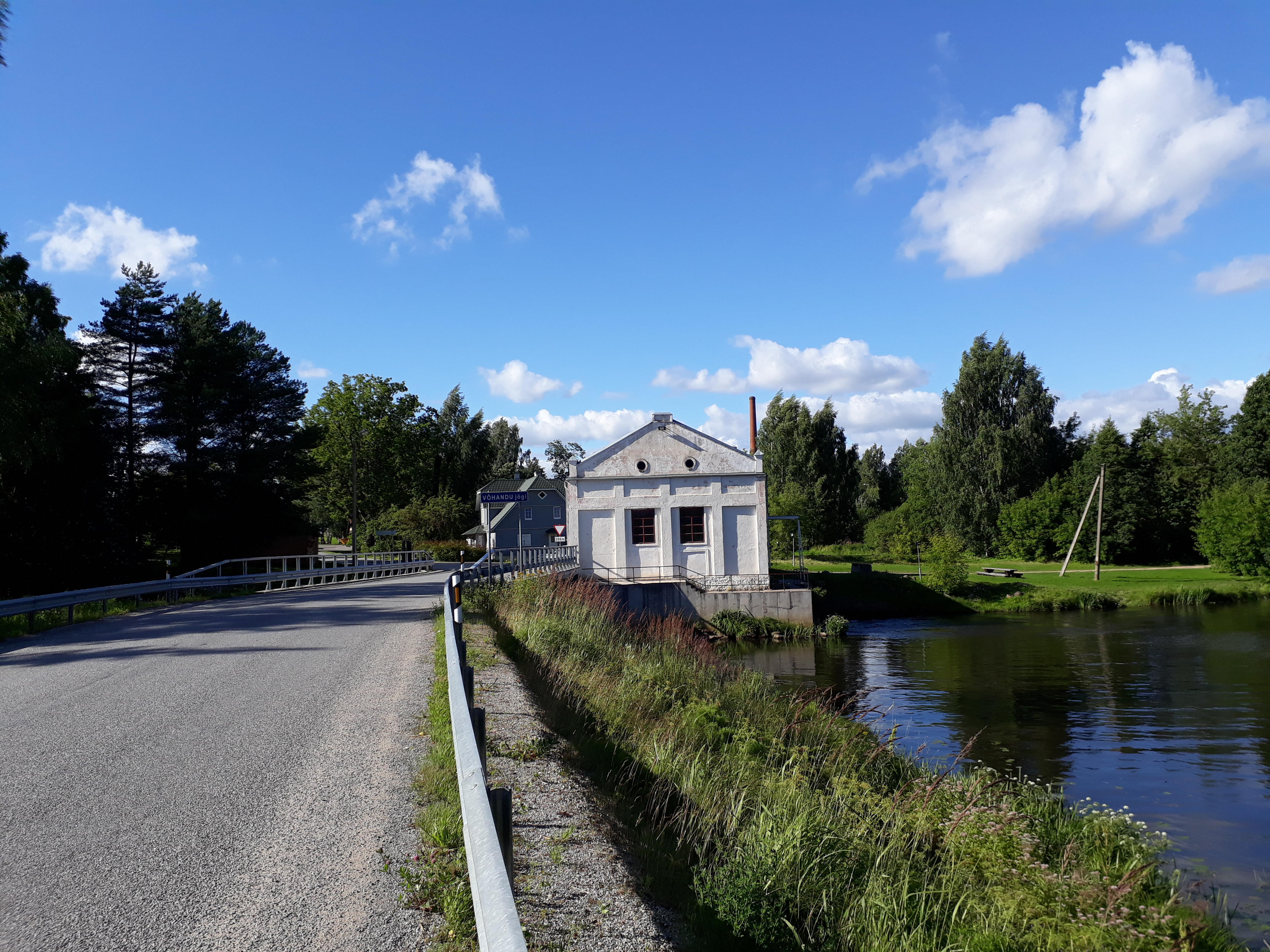 Leevaku hüdroelektrijaam